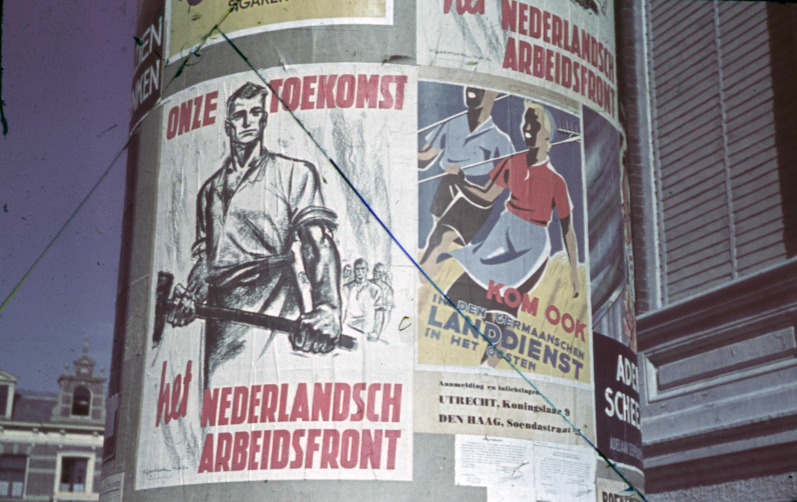 Affiche met propaganda voor het Nederlandsche Arbeidsfront. Deze foto is afkomstig uit het archief van de Fotodienst der NSB.